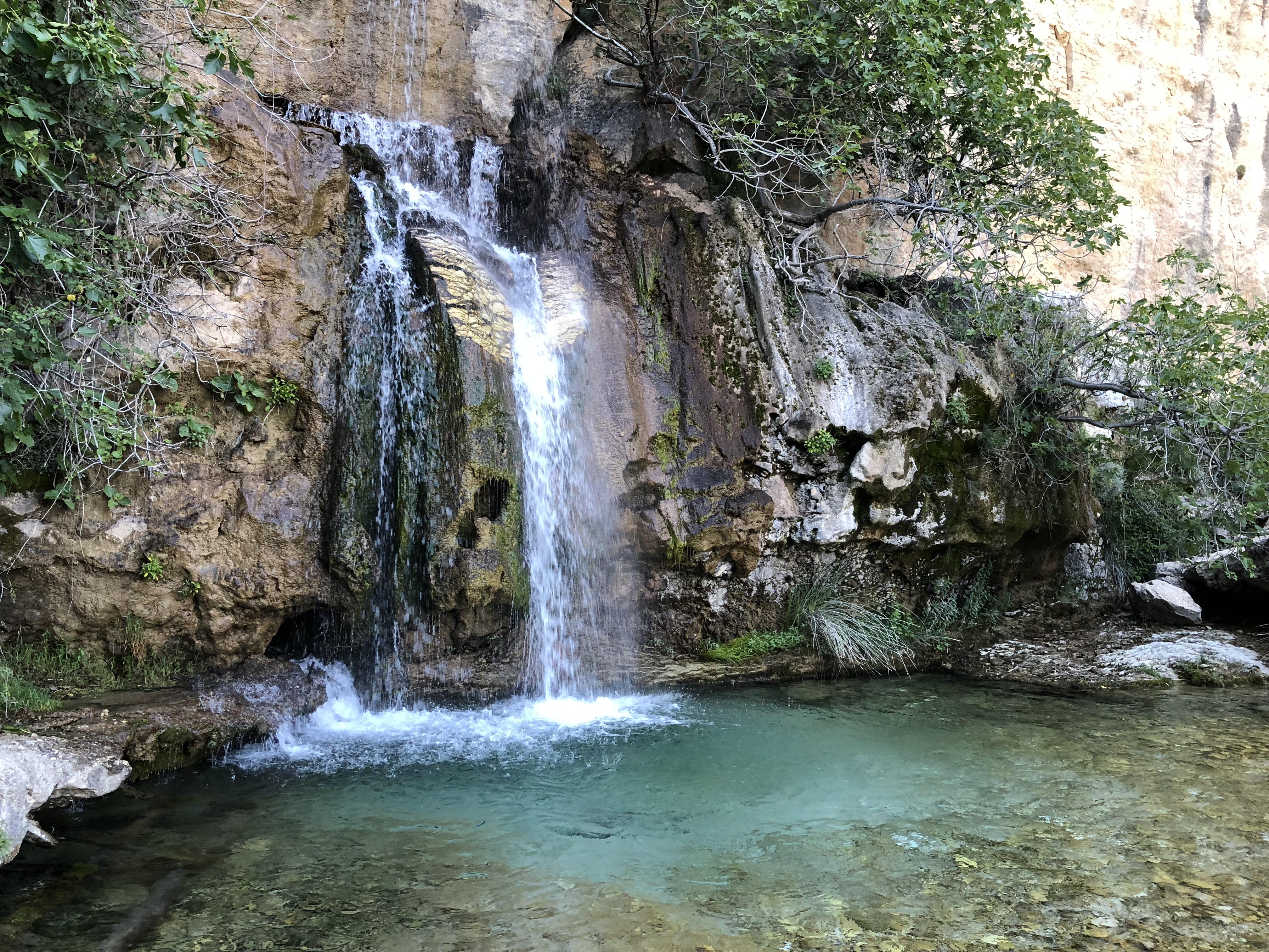 Sierra de Castril, España